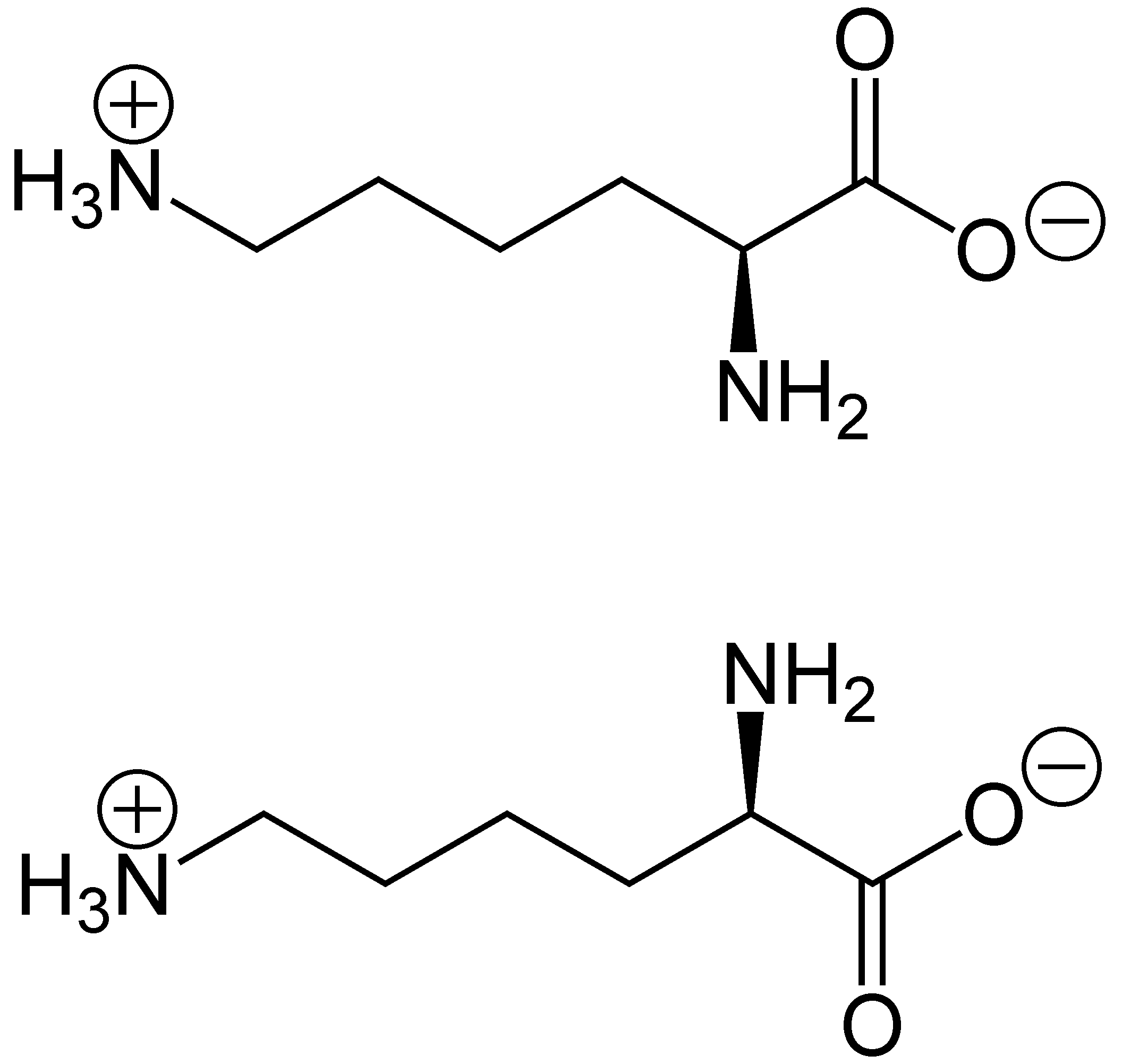 Betain-Lysin